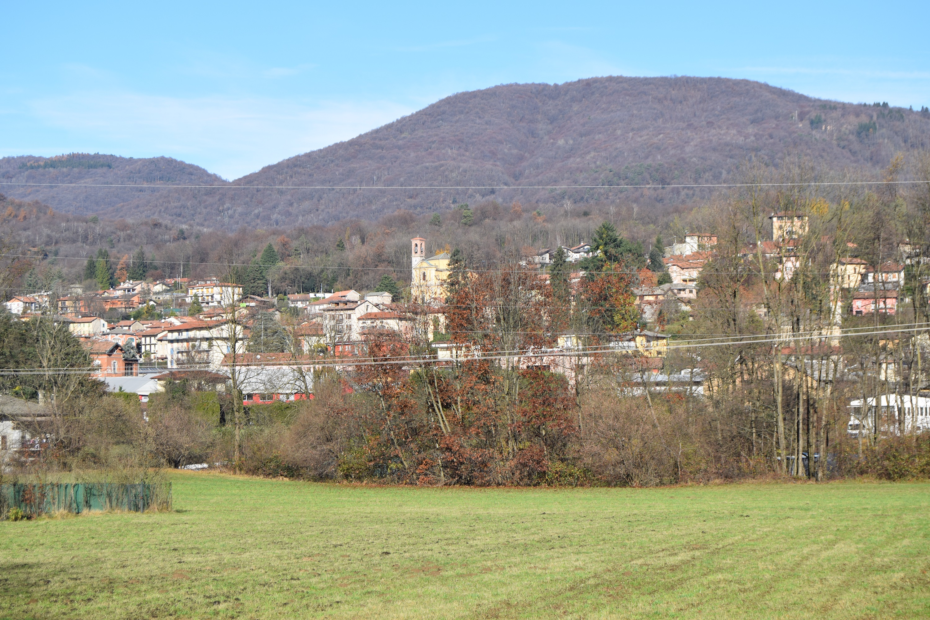 Piccolo scorcio su Cunardo